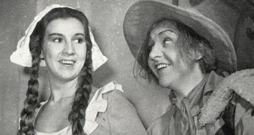 Kjerstin Dellert and Rutger Nygren in Boccacio